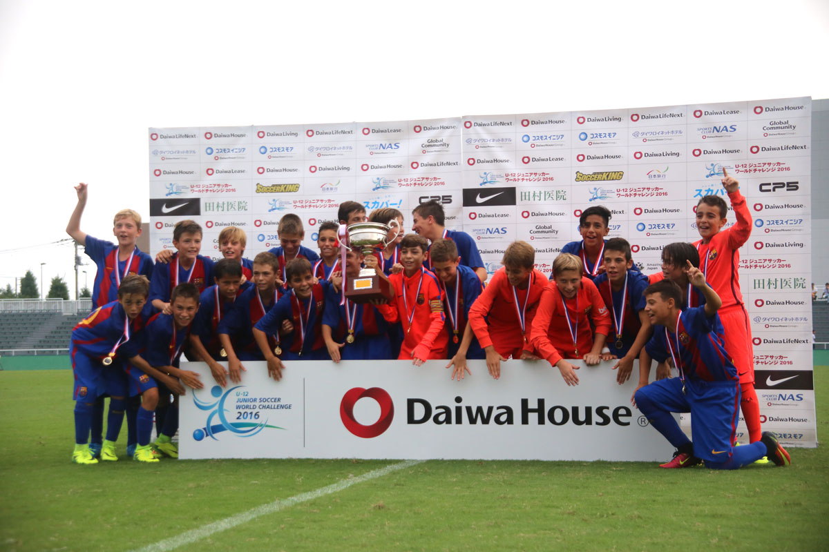 2016年大会に優勝したFCバルセロナ